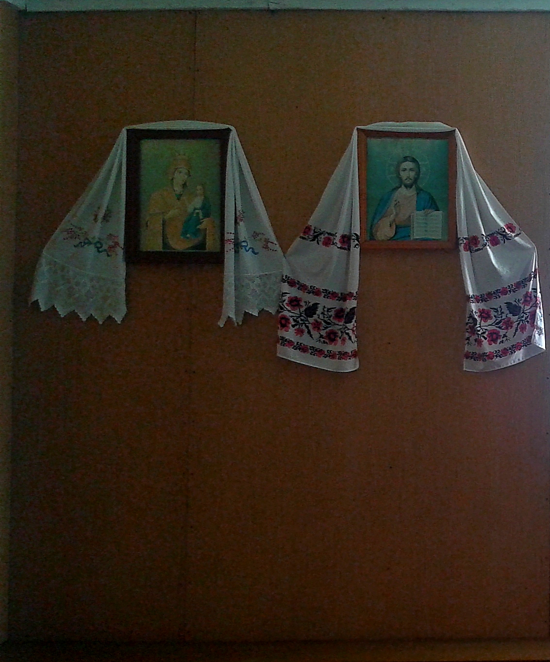 Ikony we wnętrzu cerkwi cmentarnej w Kaplonosach